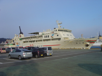 フェリー三島